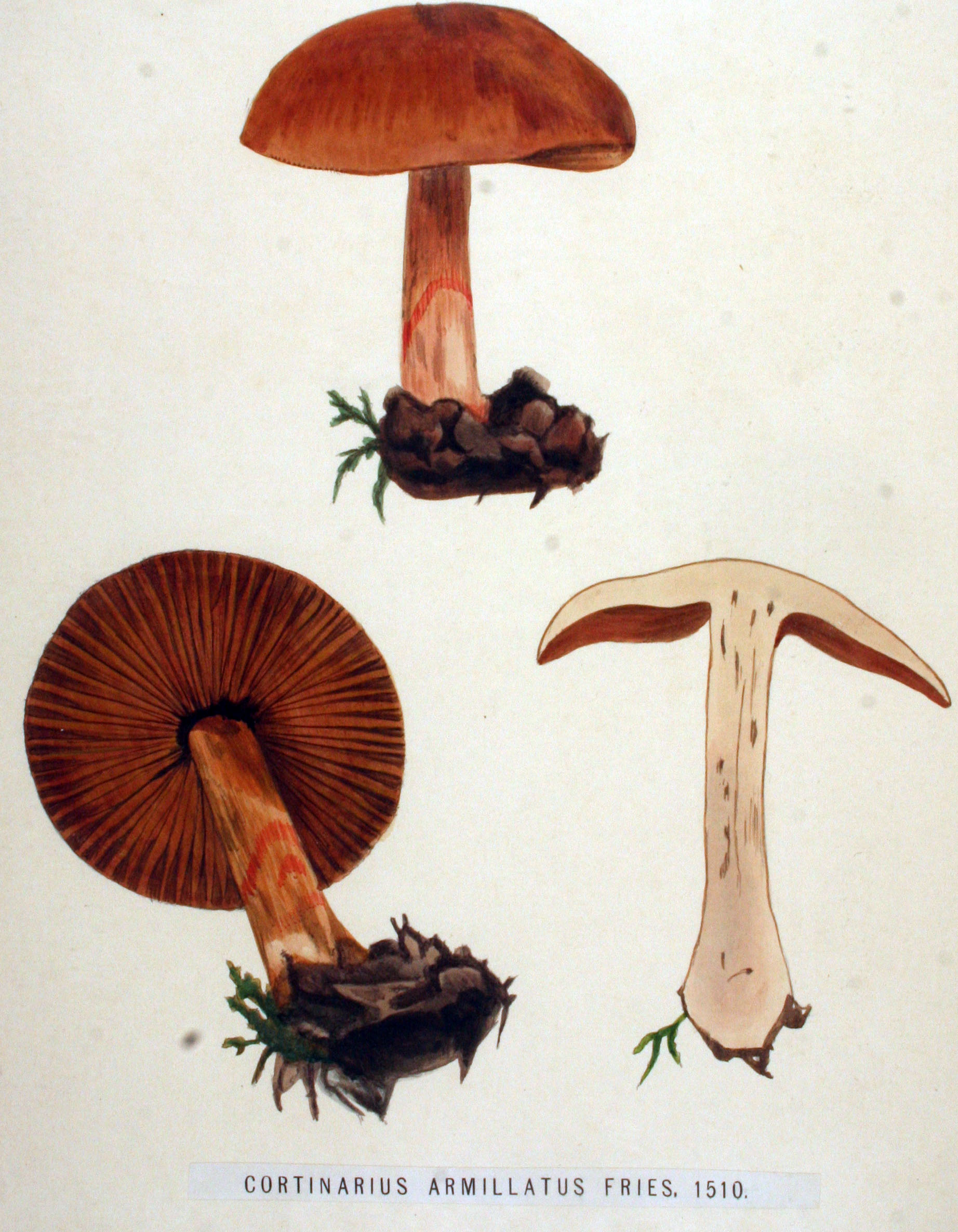 Cortinarius armillatus (Fries) Fries 1838